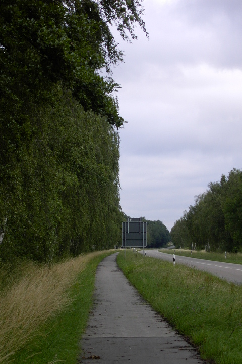 L 410, ehemalige Transitstraße, Blick in Richtung Kreisverkehr Heilder